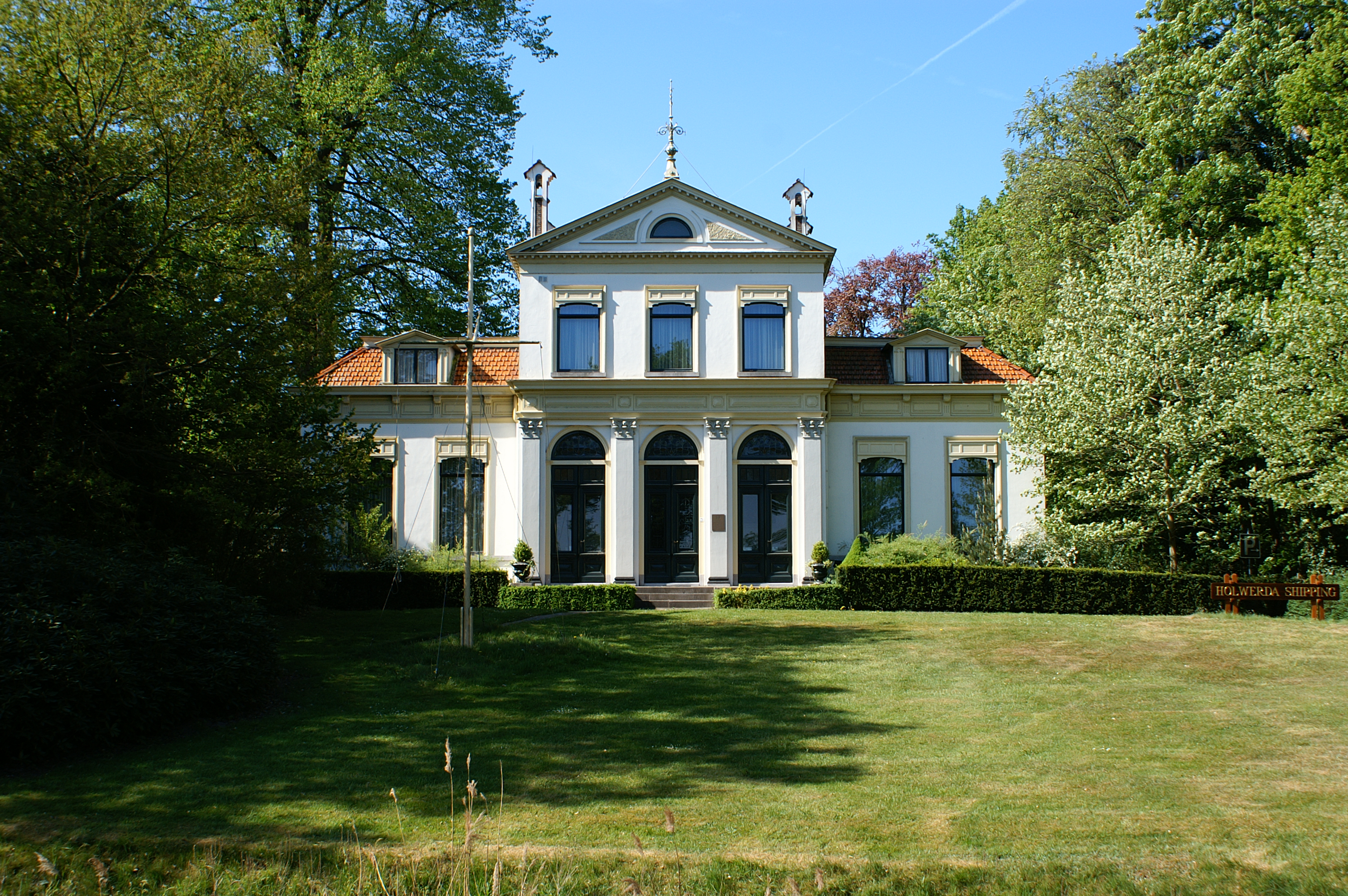 Heremastate te Heerenveen.